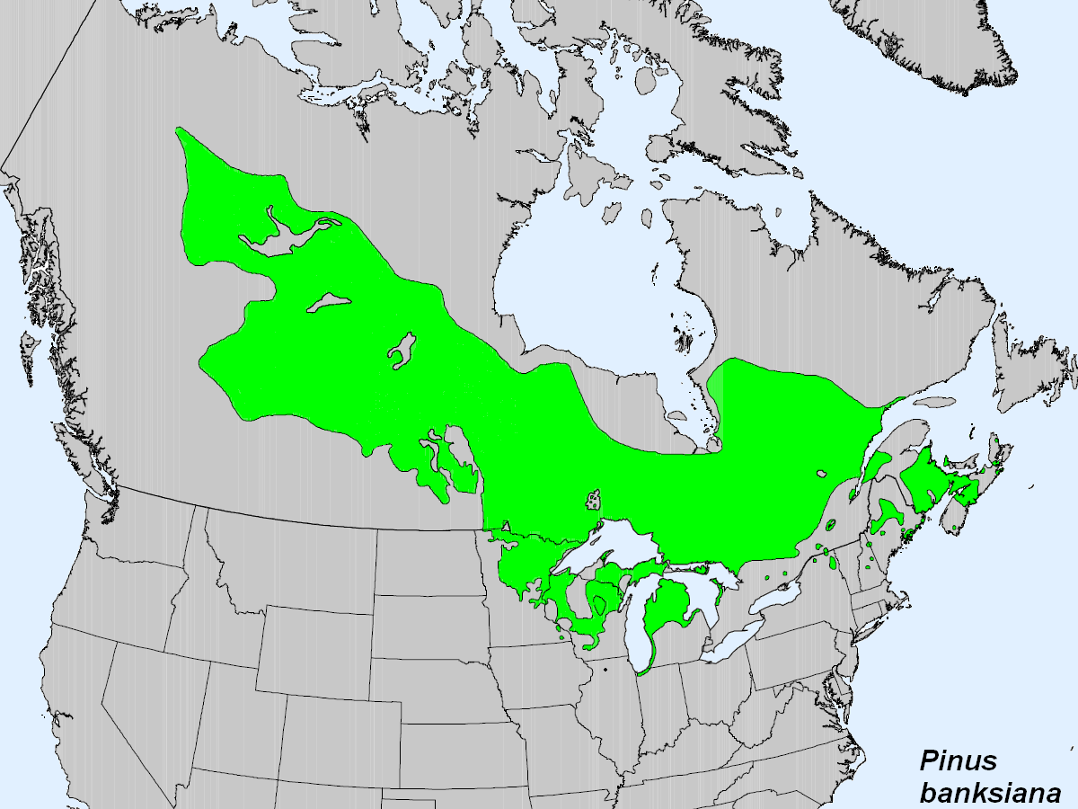 Range map of jack pine (Pinus banksiana)